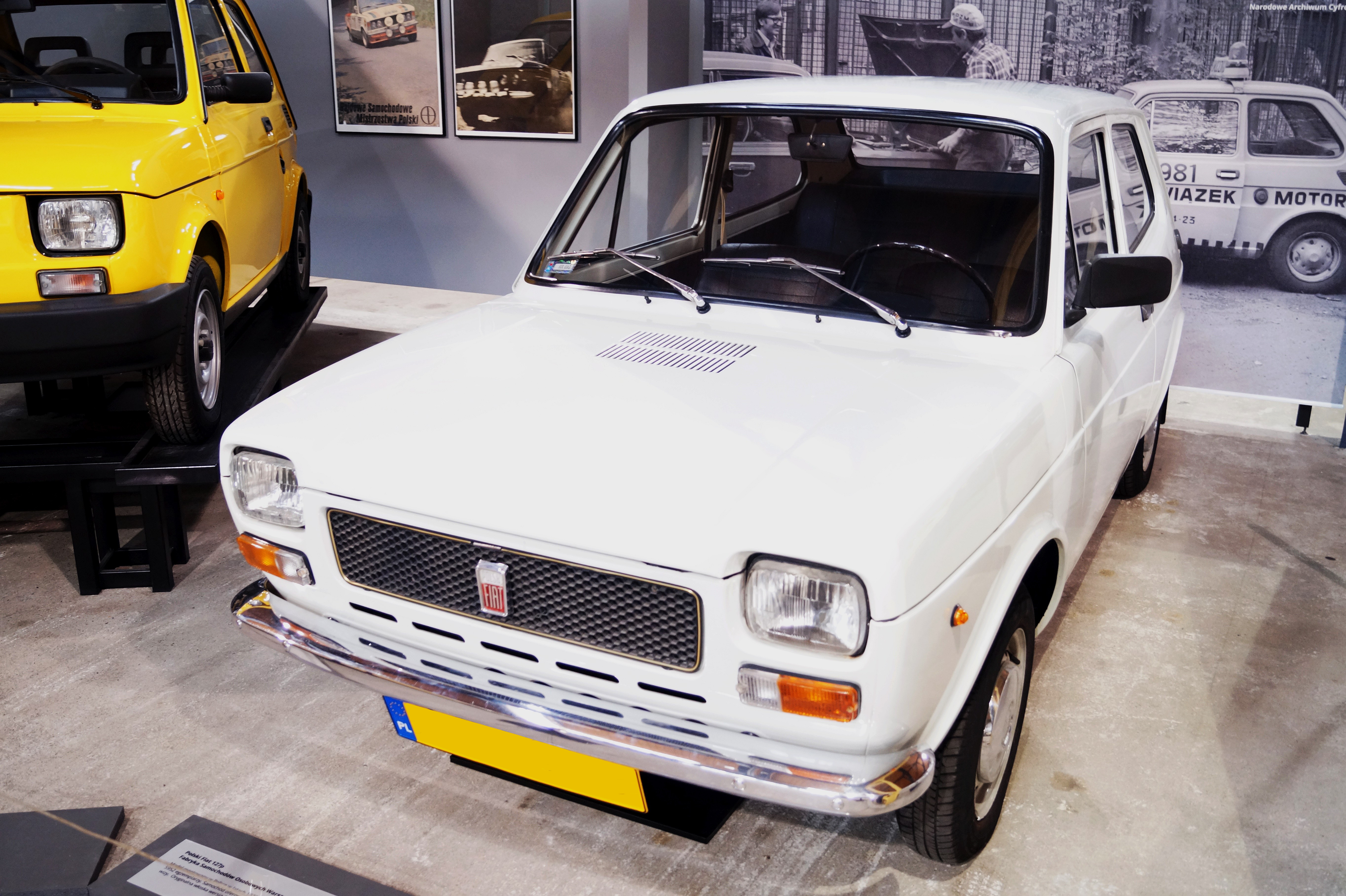 This photo was taken during Automotive Wikiexpedition 2016 set up by Wikimedia Polska Association.You can see all photographs in category Wikiekspedycja motoryzacyjna 2016. English | polski | +/− Polski Fiat 127p w Muzeum Inżynierii Miejskiej w Krakowie